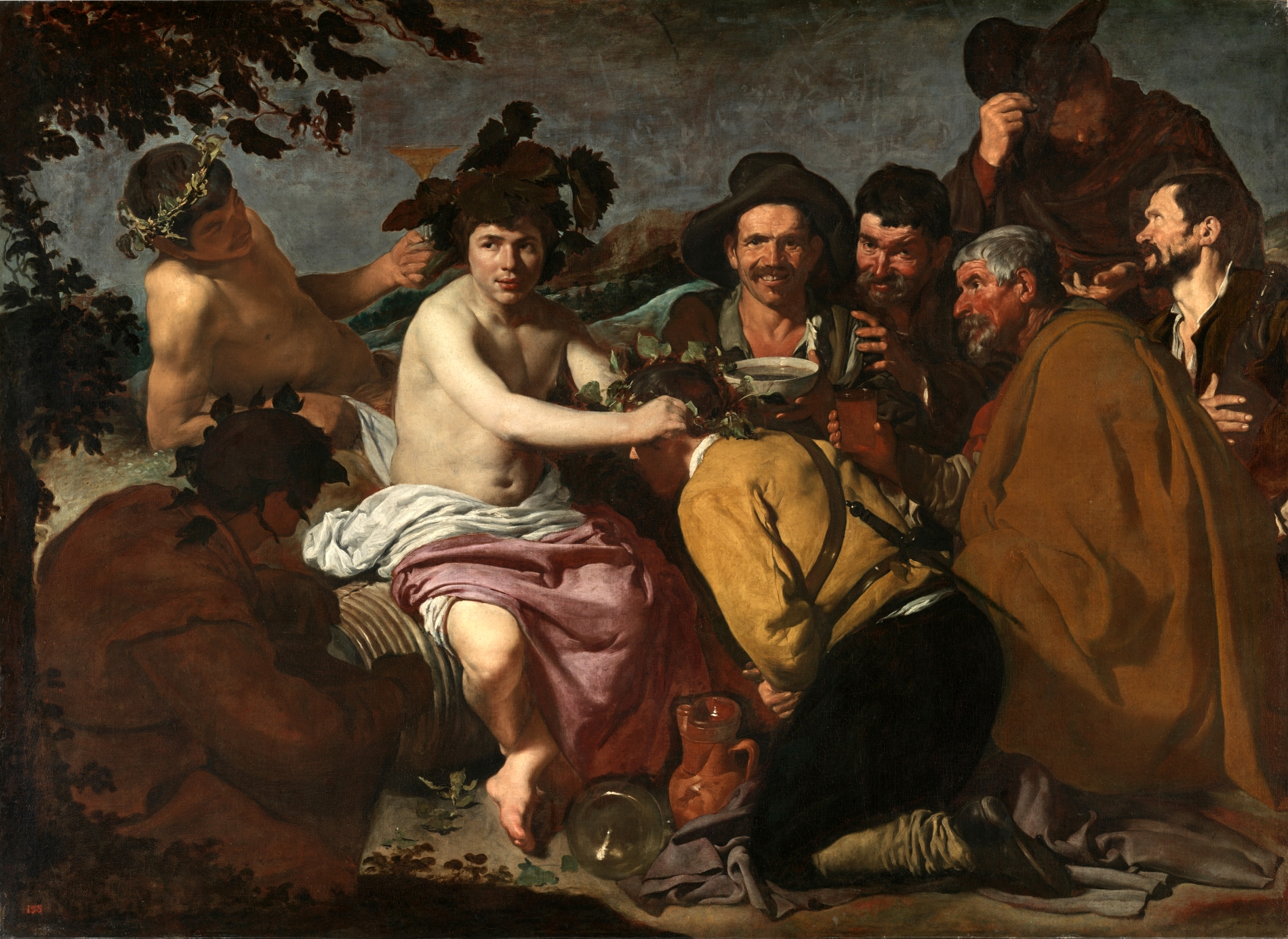 La obra, titulada El triunfo de Baco o Los Borrachos, es una de las obras mitológicas más conocidas del pintor sevillano Diego Velázquez.